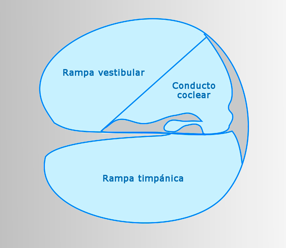 Esquema del conducto coclear